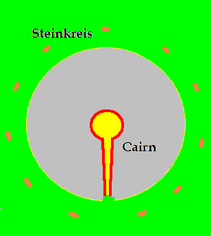 Clava